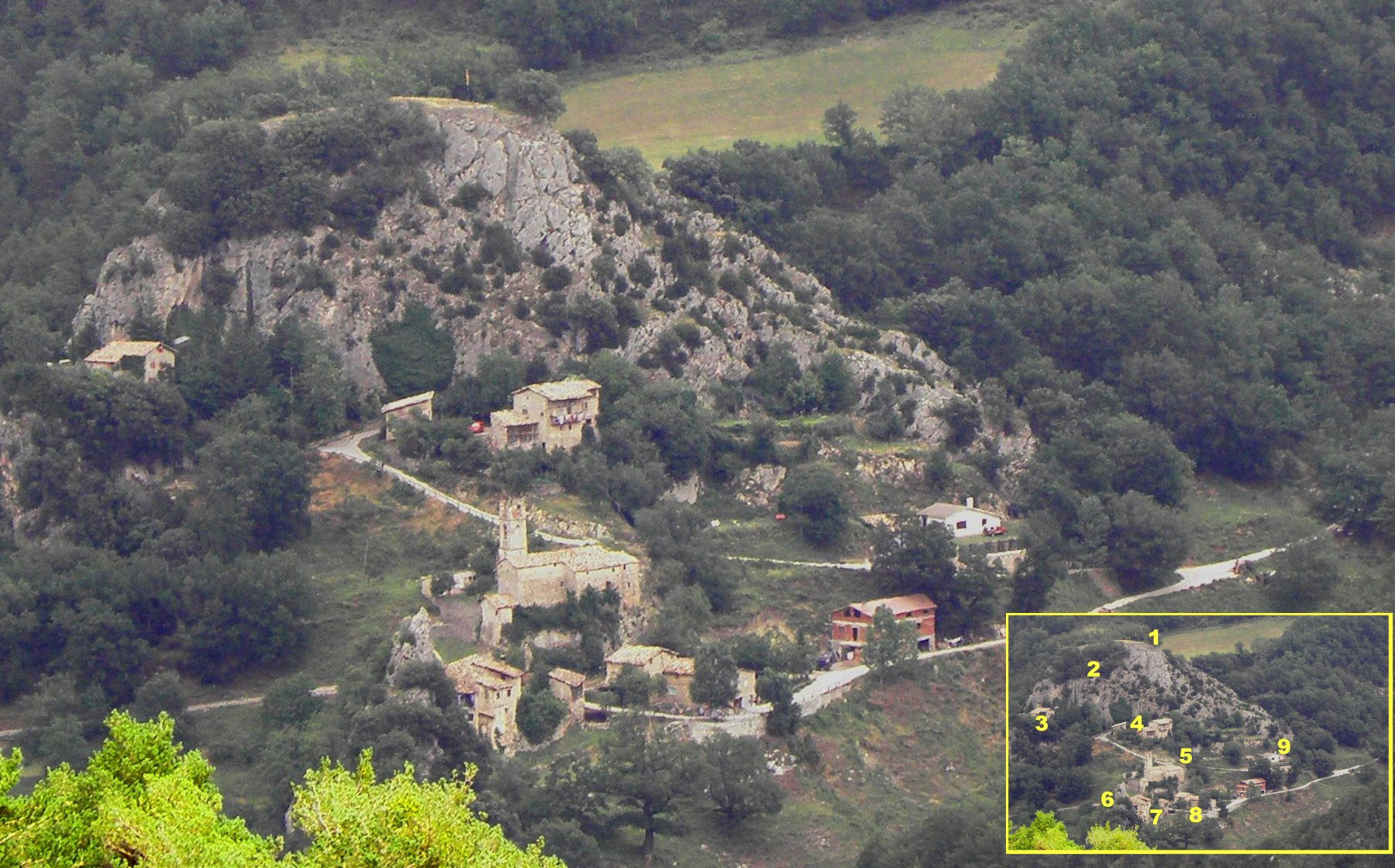 El nucli de la Pedra (municipi de la Coma i la Pedra), a la Vall de Lord (Solsonès), vist des de les Costes de les Barraques (sud-oest) LLEGENDA: 1 - Restes del Castell de la Pedra. 2 - El Roc de la Pedra. 3 - Cal Marcó. 4 - El Xalet. 5 - L'església parroquial de Sant Sadurní de la Pedra. 6 - El cingle de la Rectoria 7 - La Rectoria. 8 - Cal Guerra. Cal Mallol.